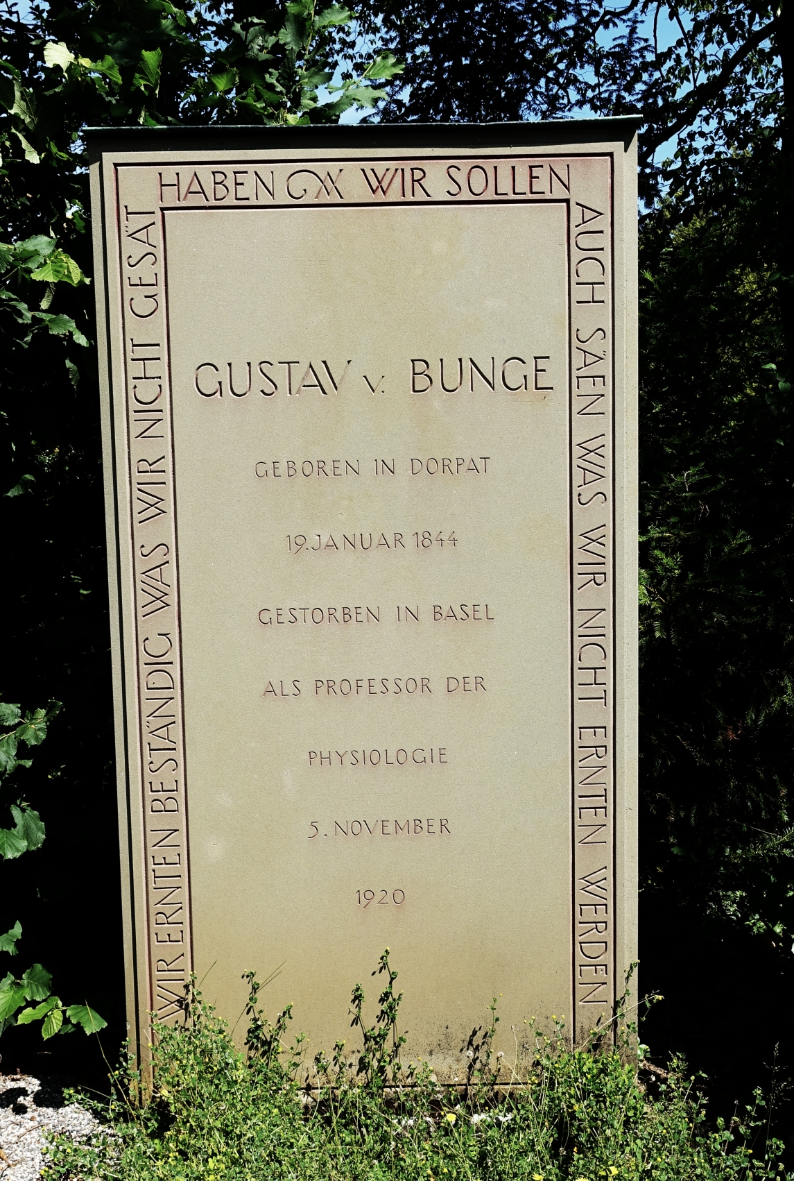 Gustav von Bunge (1844–1920) Professor der Physiologie, Forscher und Humanist. Grab auf dem Friedhof Wolfgottesacker, Basel